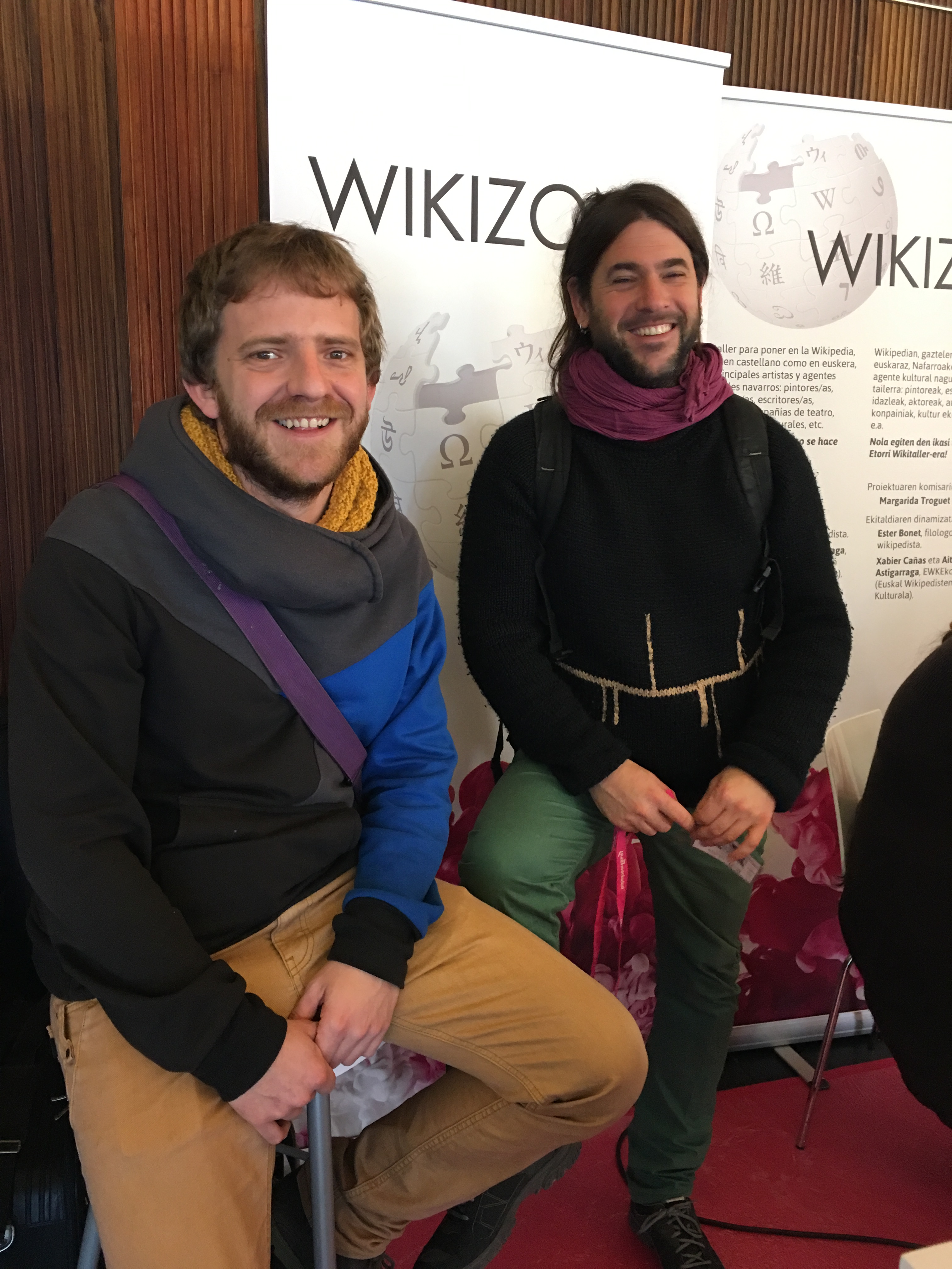 Merkatua